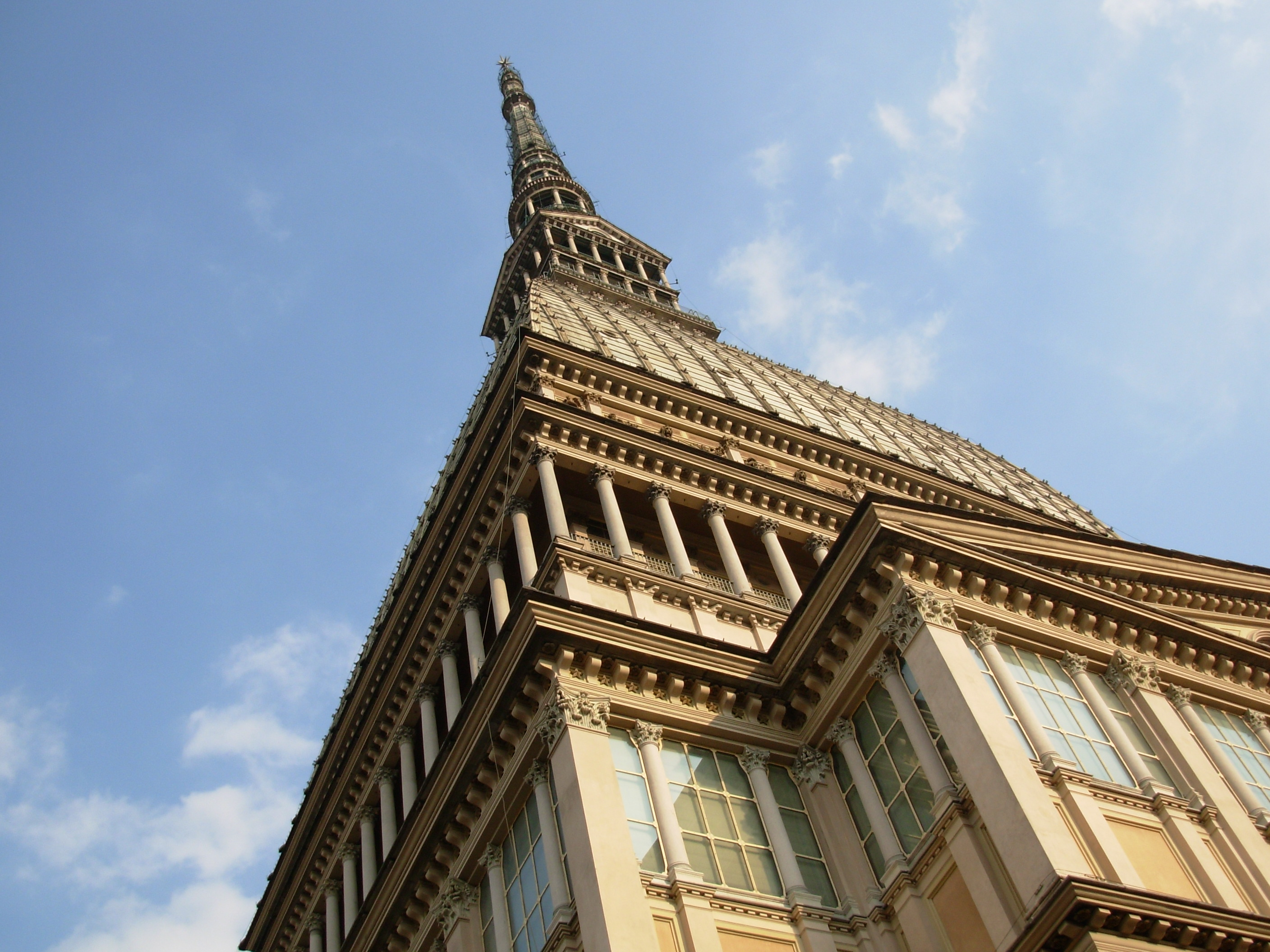 Mole Antonelliana